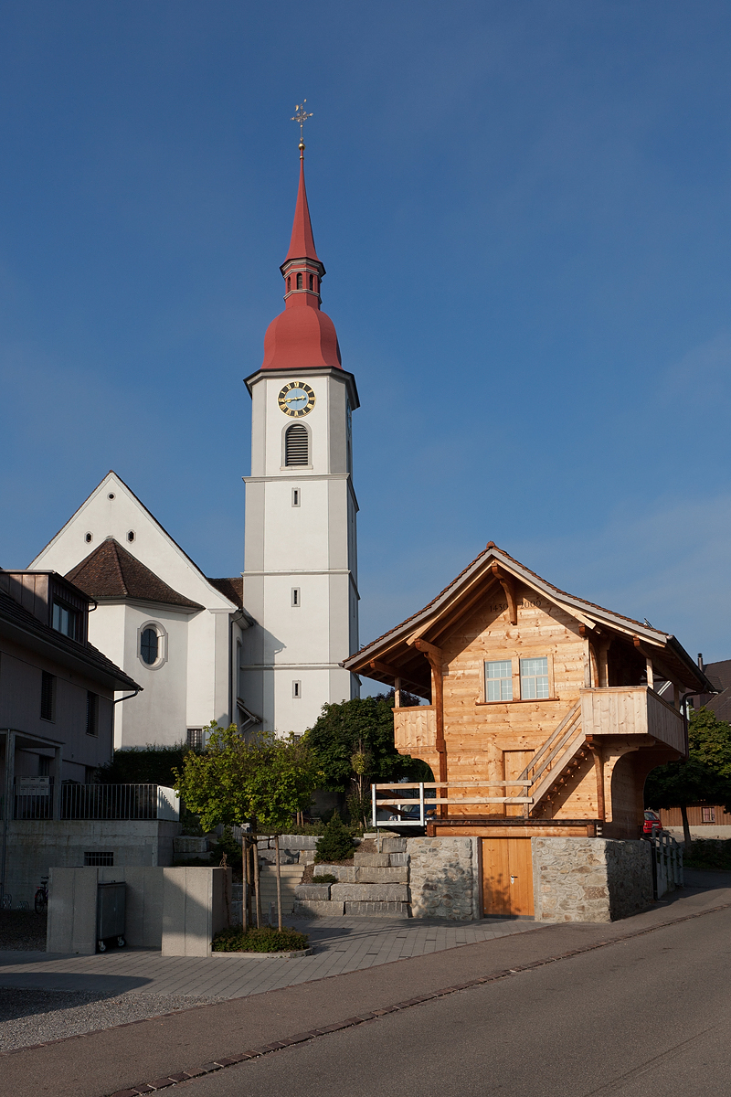 Kirche St. Nikolaus in Auw und Spycher aus dem Jahre 1430 (restauriert 2009)